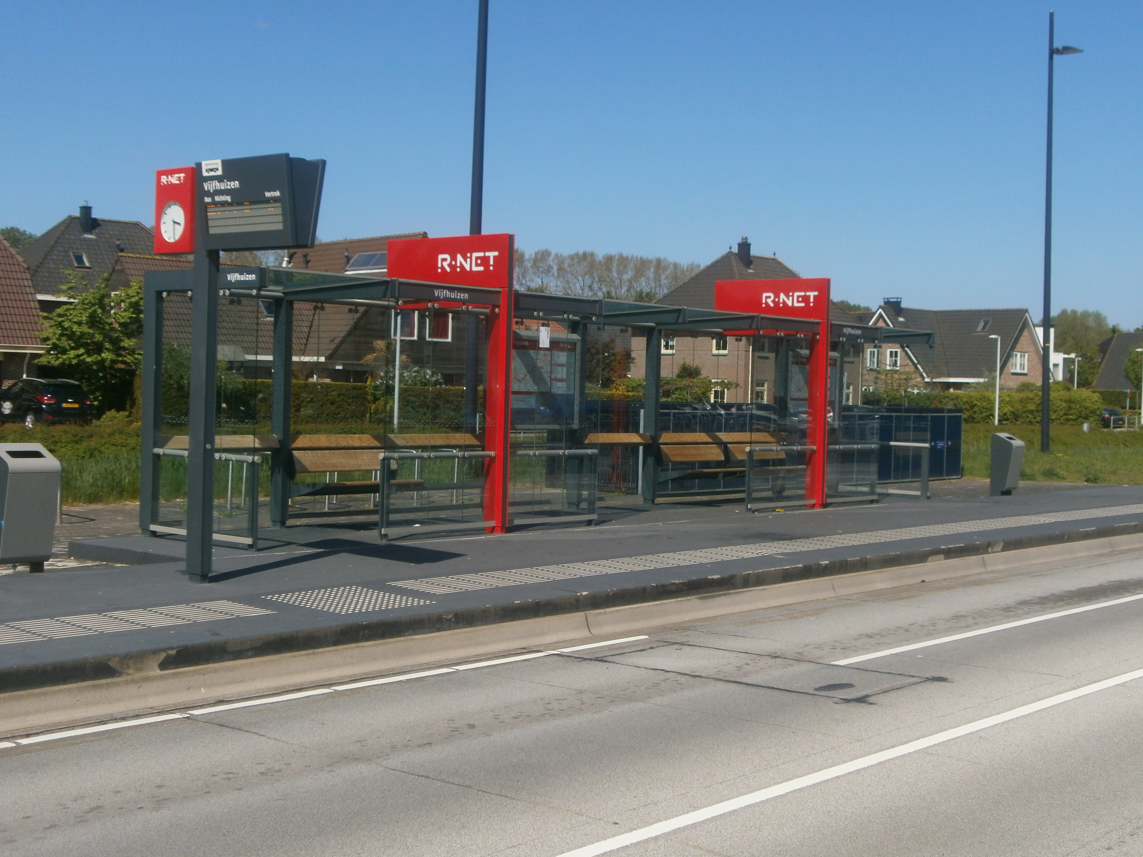 Bushalte Vijfhuizen R-net lijn 300 (Zuidtangent)